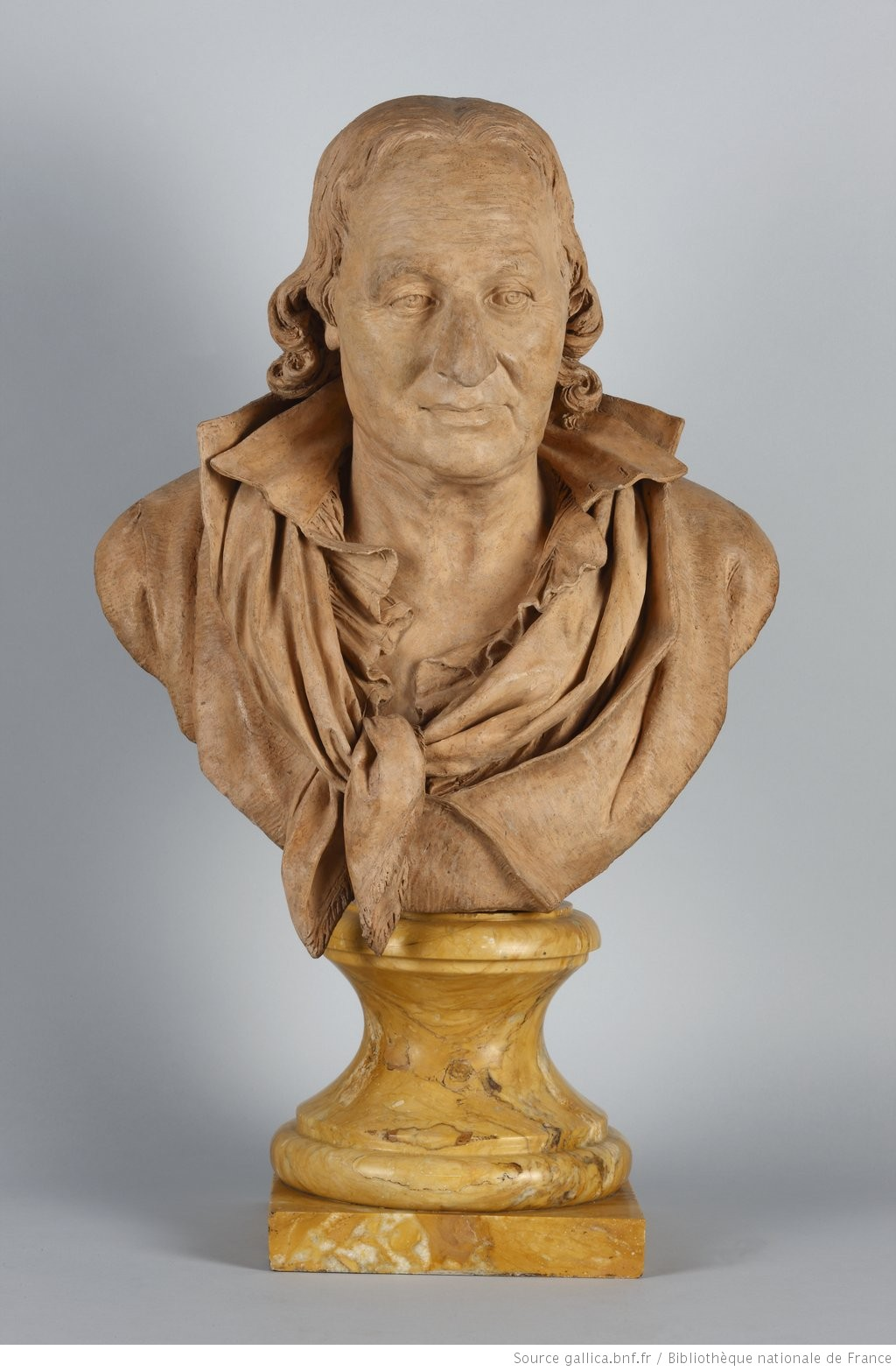 Titre original : Portrait en buste de l’ancien garde des estampes de la Bibliothèque nationale, Hugues-Adrien Joly, terre-cuite, 1797.